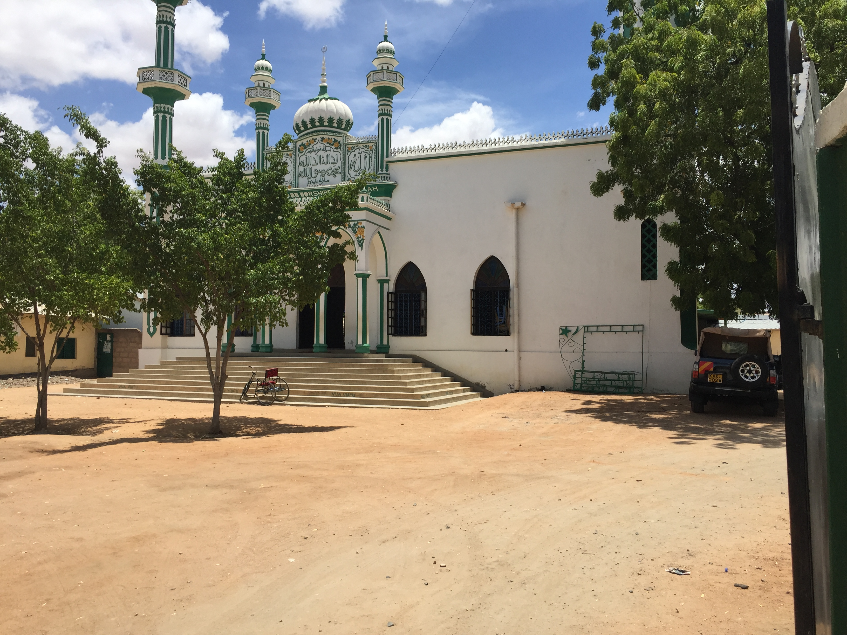 Garissa Mosque